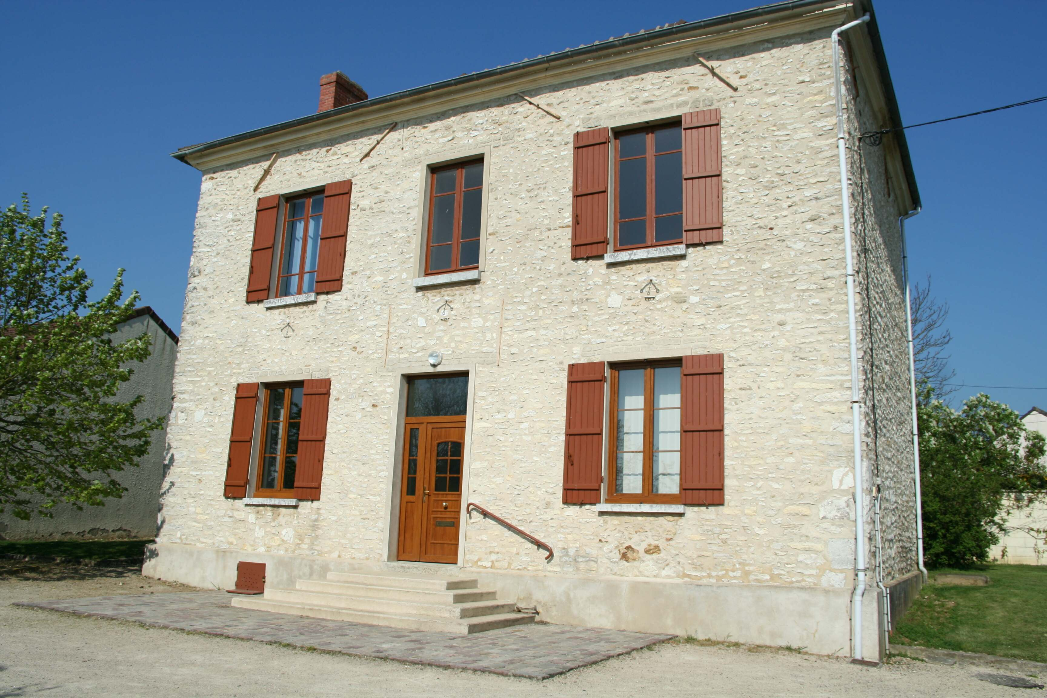 Mairie de Neauphlette - Yvelines (France)